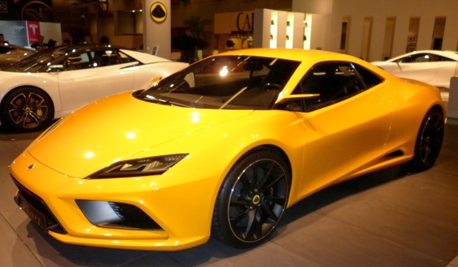 Stand Lotus Mondial de Paris